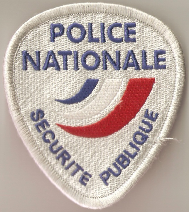 Frans politie embleem